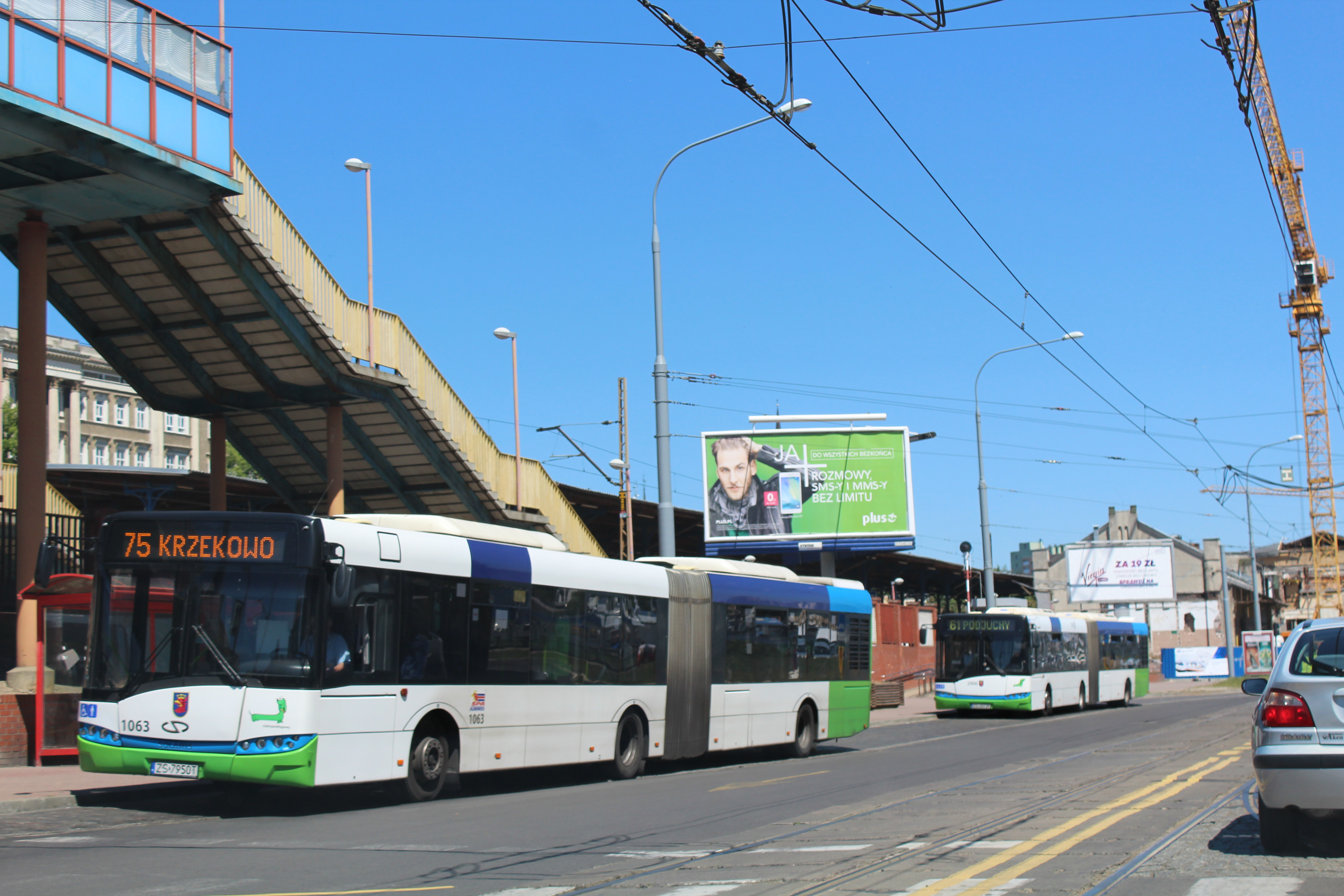 Ulica Krzysztofa Kolumba w Szczecinie